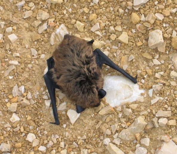 Savijev netopir Hypsugo savii, žrtev vetrne elektrarne Trtar-Krtolin